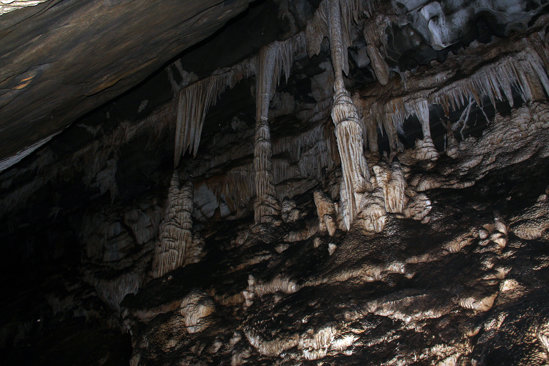 Parque Estadual do Alto Ribeira, estado de São Paulo, Brasil.